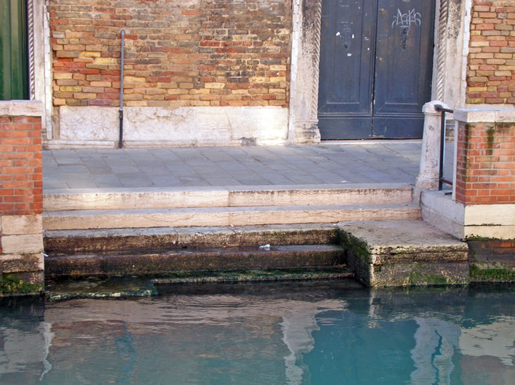 "Riva perpendicolare" (vicolo che costeggia un canale) a Venezia.